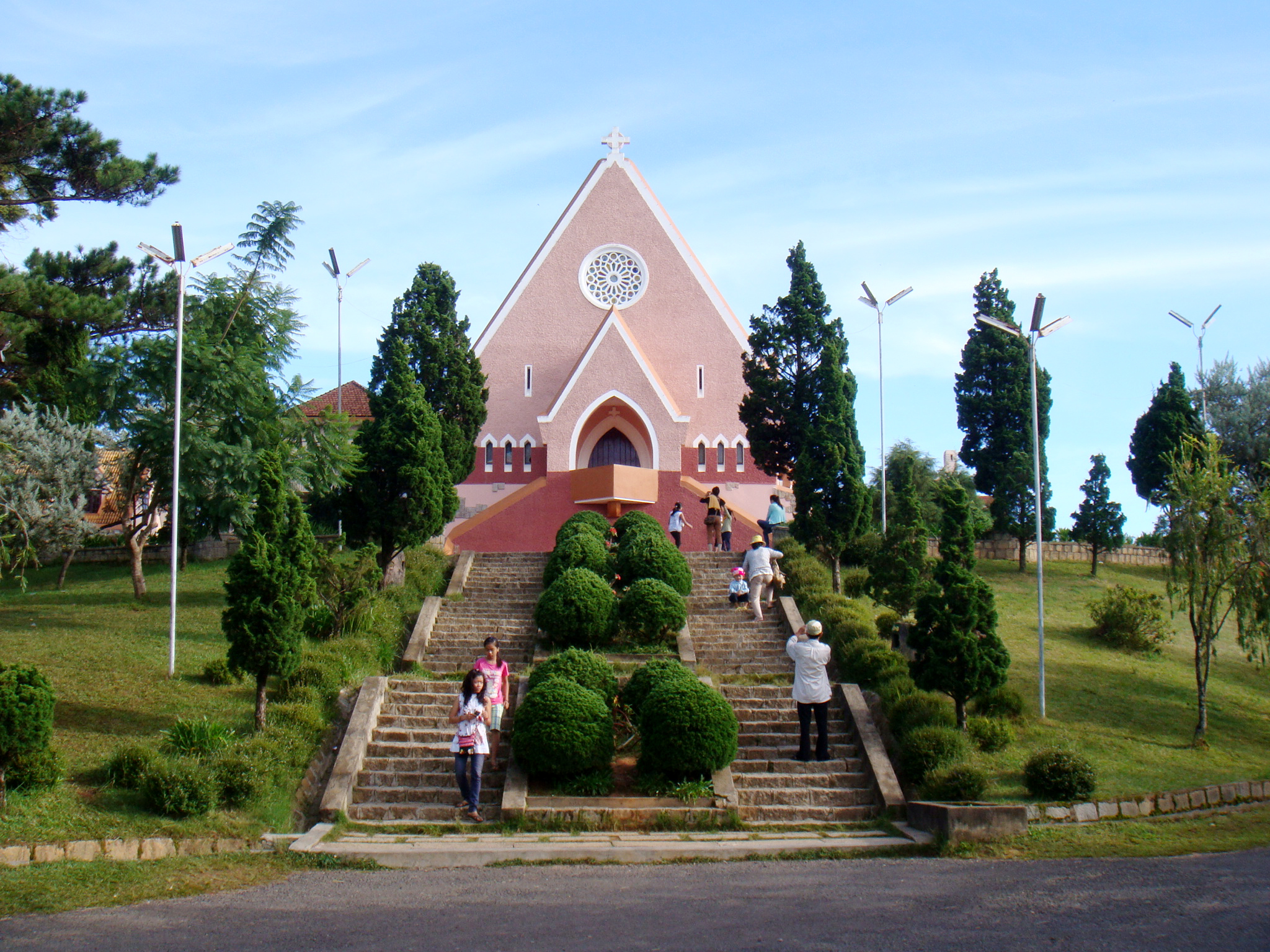 Domaine de Marie in Da Lat, Vietnam